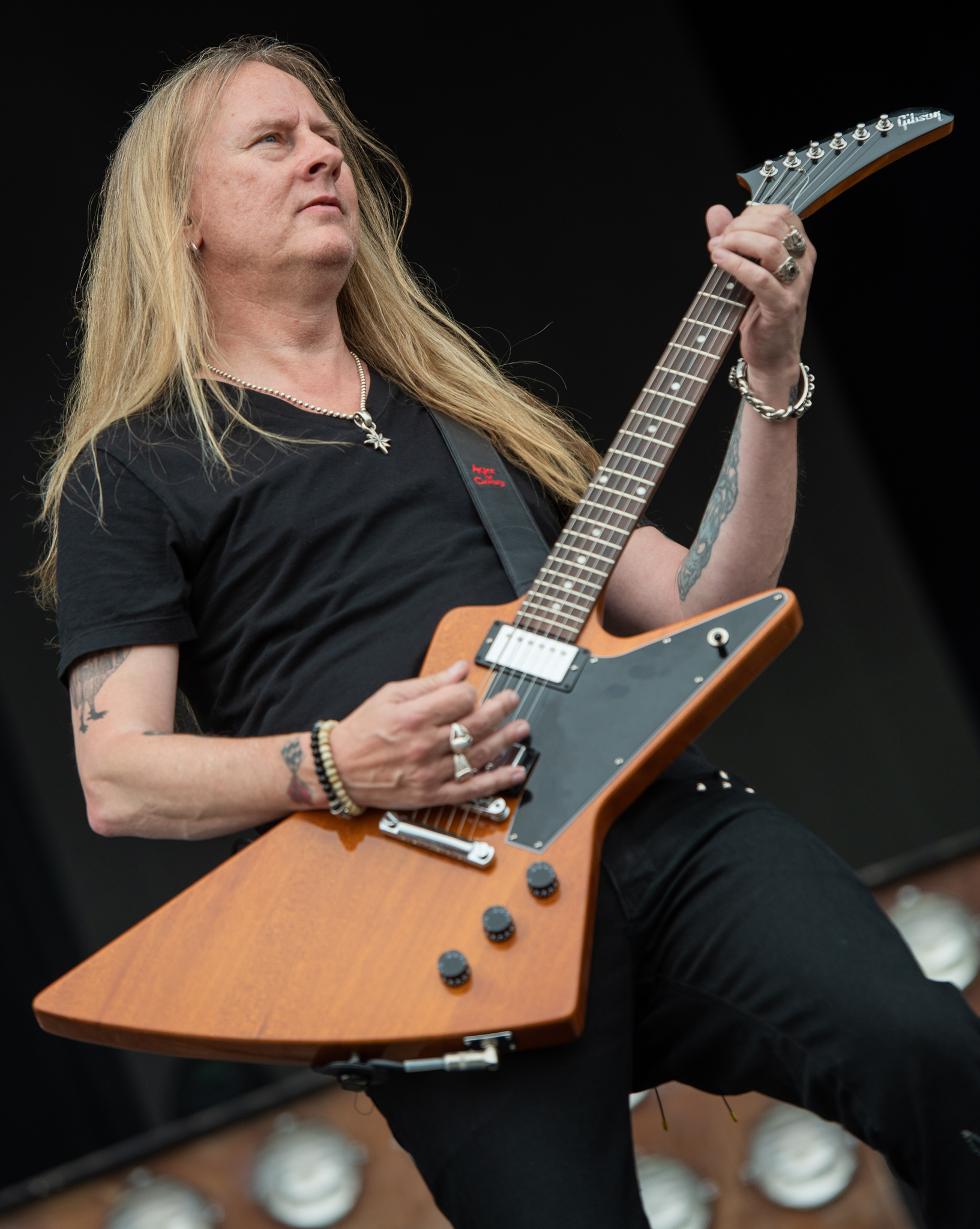 ARGO-Konzerte,Alice in Chains,Jerry Cantrell,Konzert,Livekonzert,Livemusik,Musik,RiP,Rock im Park 2019,Zeppelin Stage